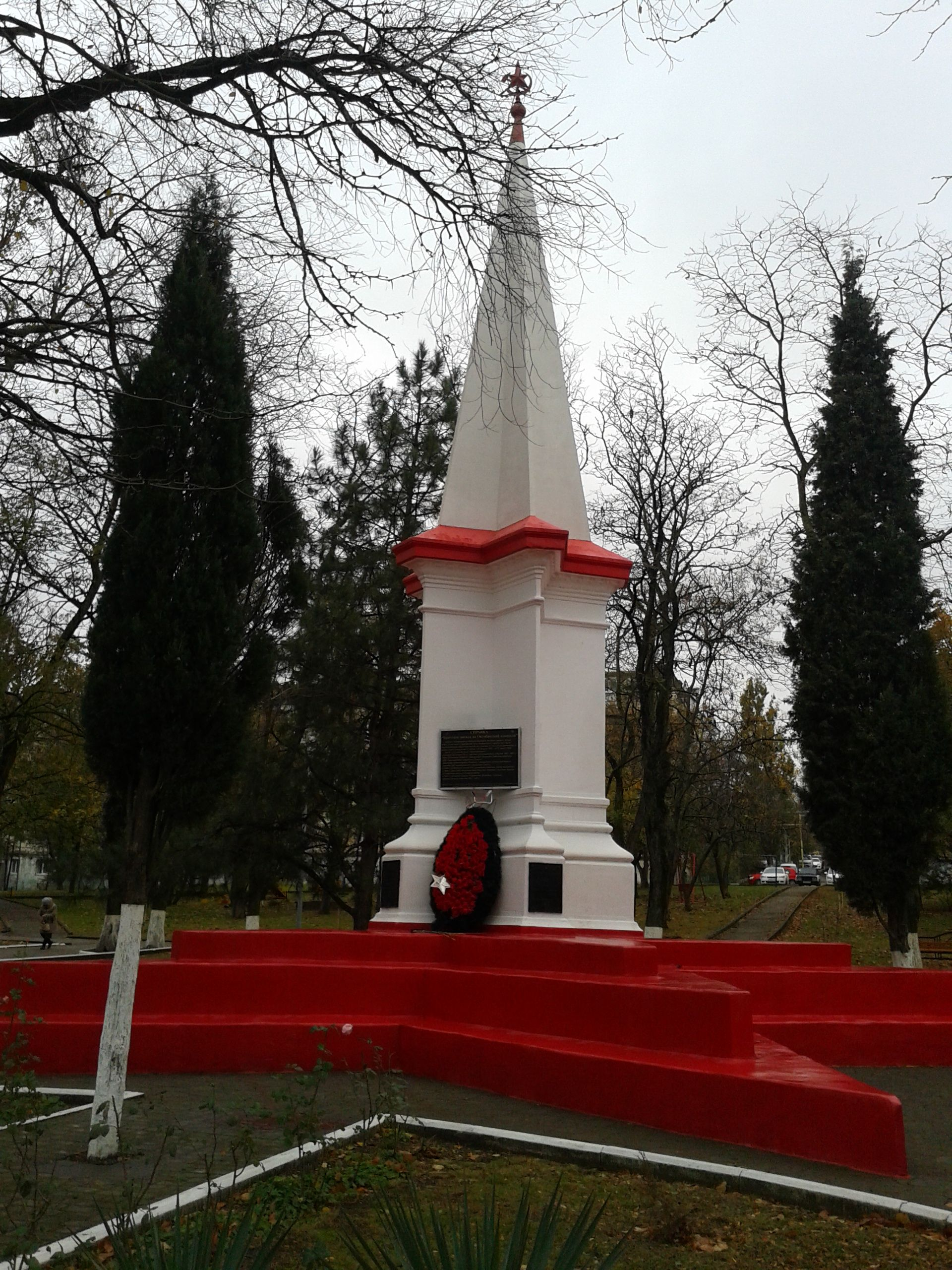 Памятник на Октябрьской площади, Новороссийск